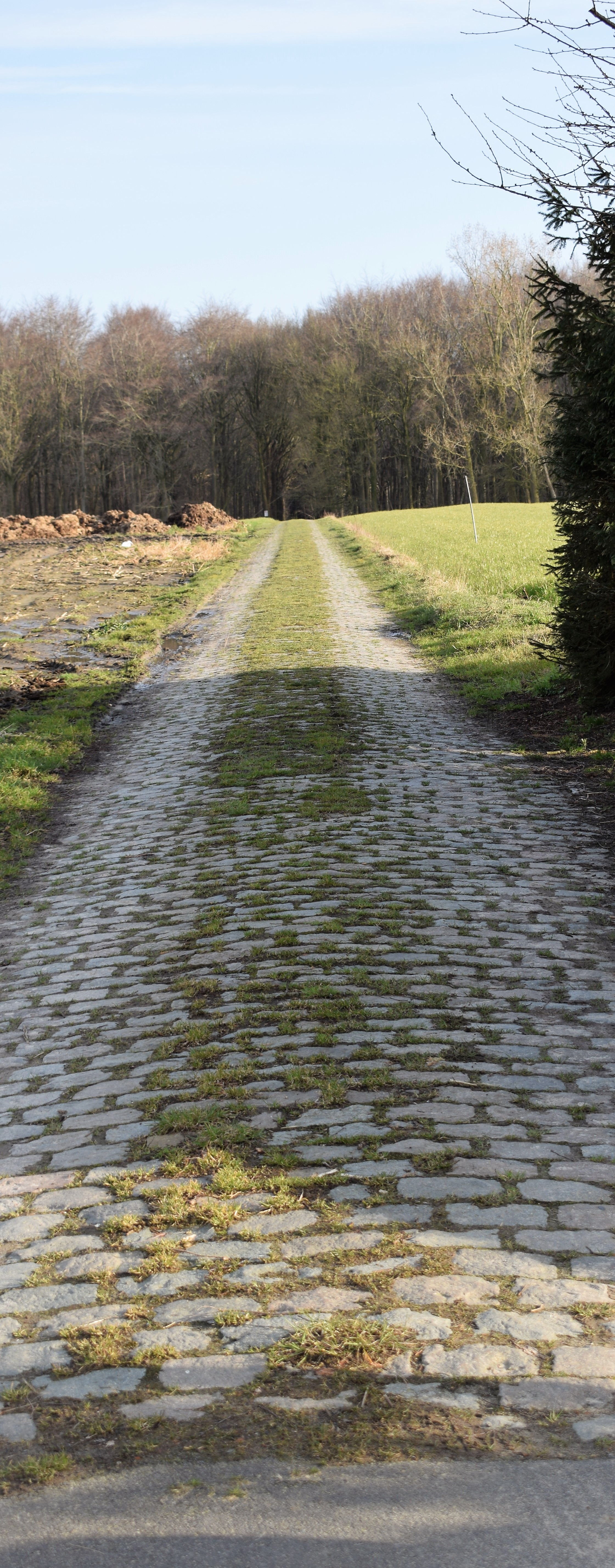 Deze weg leidt naar de Roopijpfontein